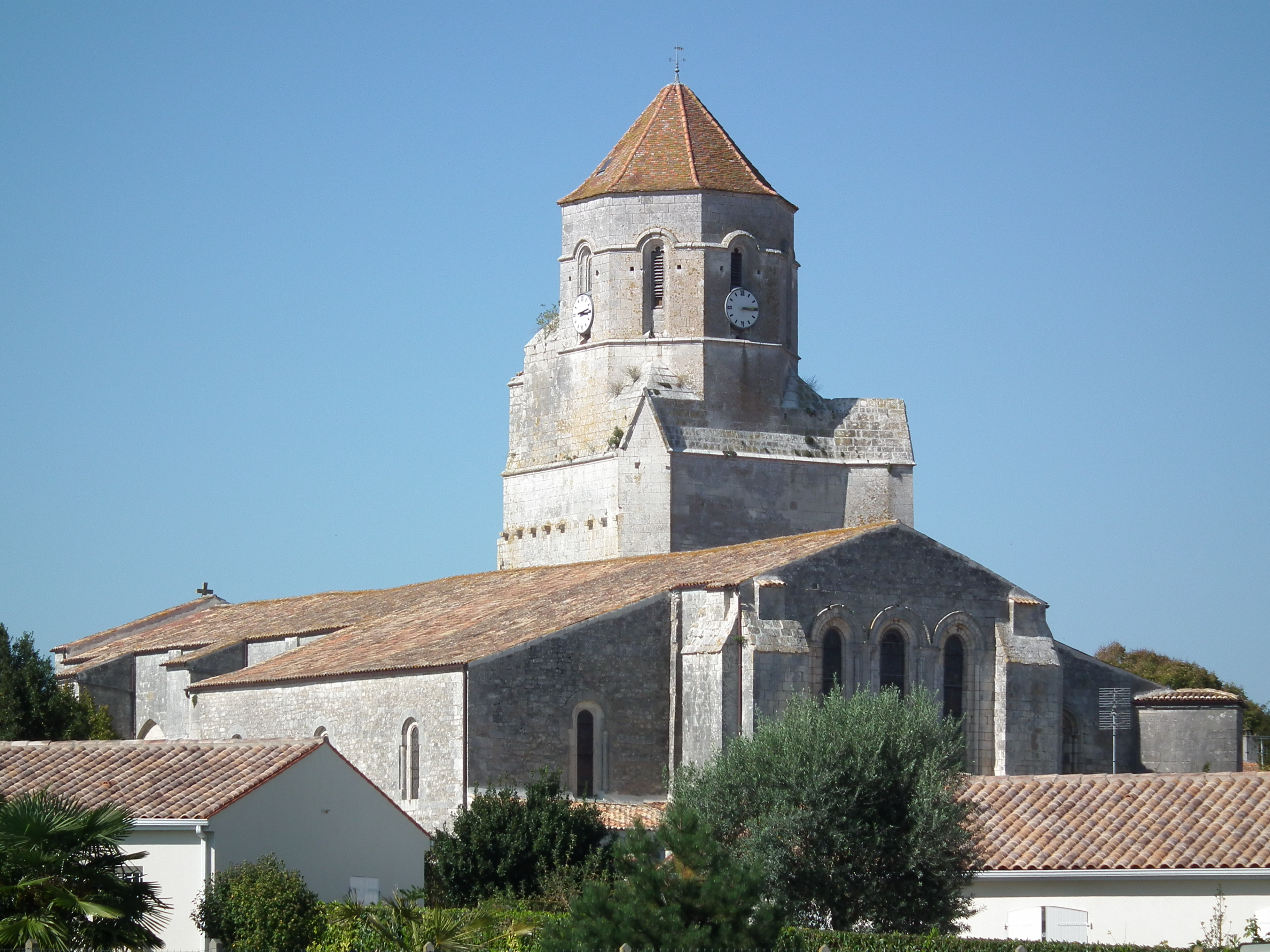 L'église de Cozes